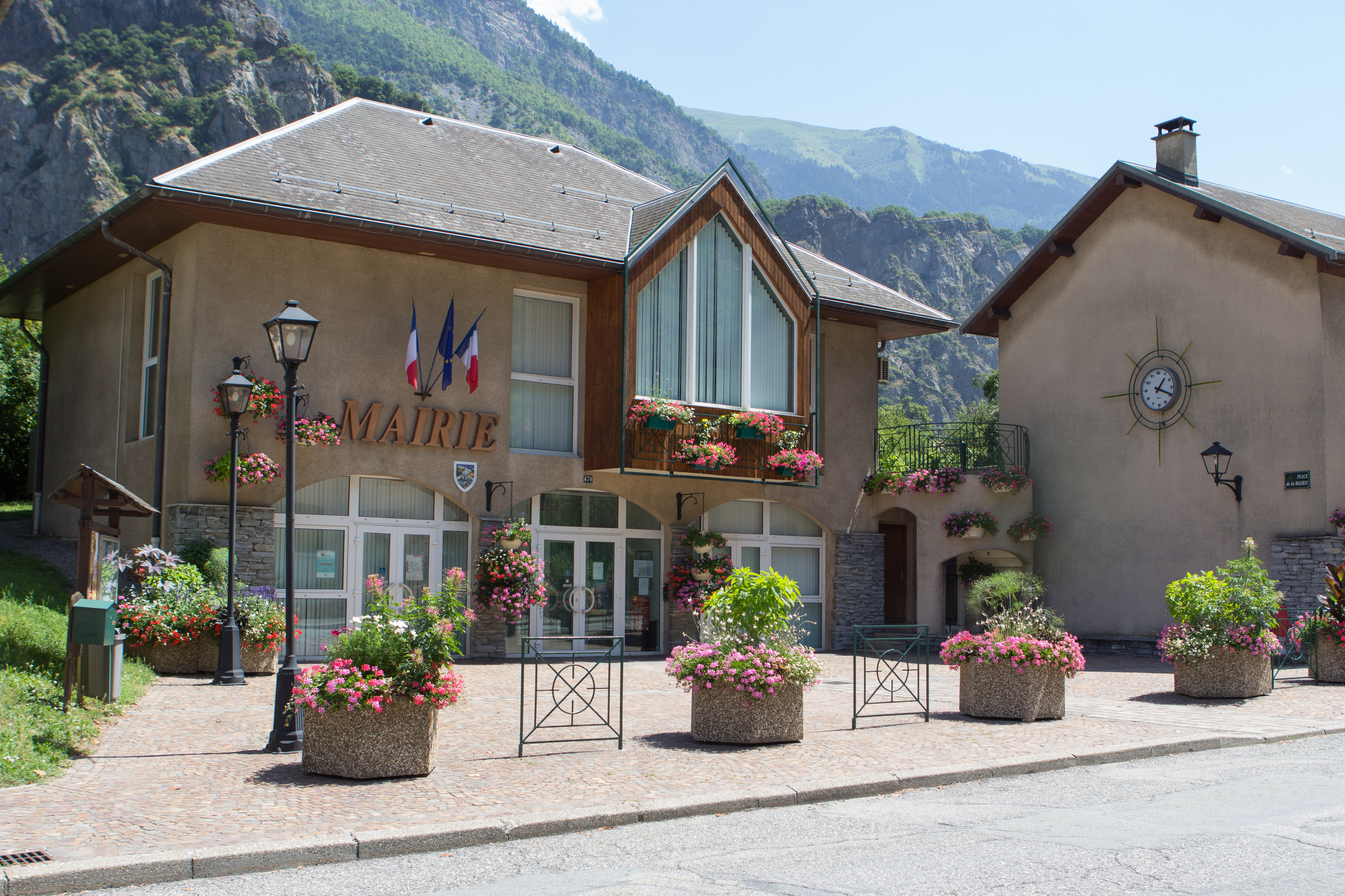 Mairie de Pontamafrey-Montpascal / Pontamafrey-Montpascal / Savoie / France